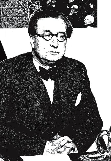 Manuel Abril